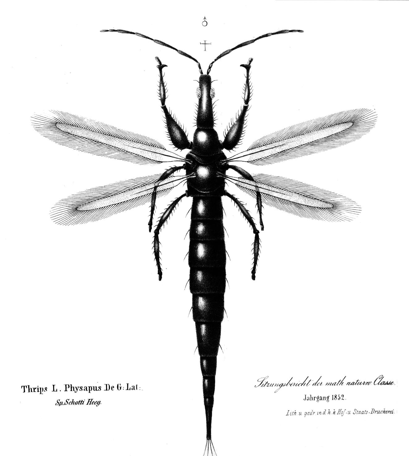 Thrips schottii Heeger